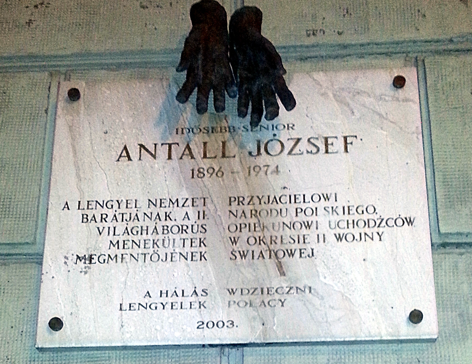 Id. Antall József emléktáblája, Budapest V. kerület, Ferenciek tere 9. (Thury Levente alkotása.)